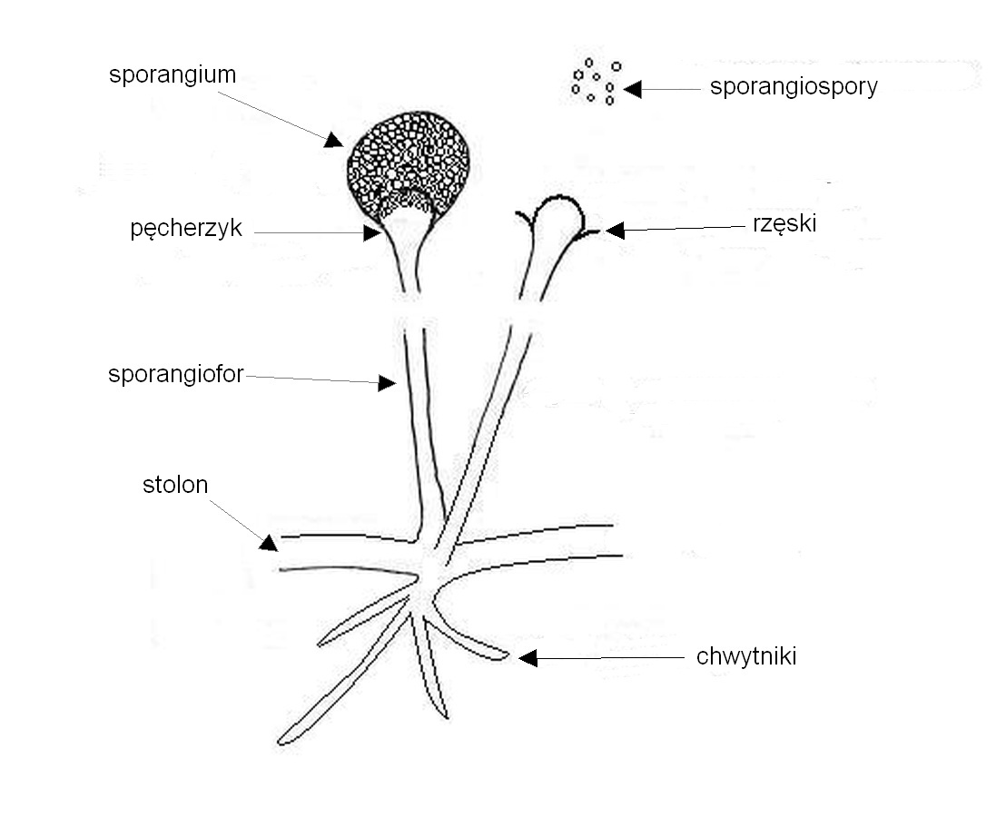 Rhizopus sp. Budowa